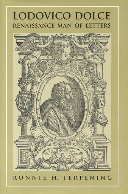 Lodovico Dolce book cover